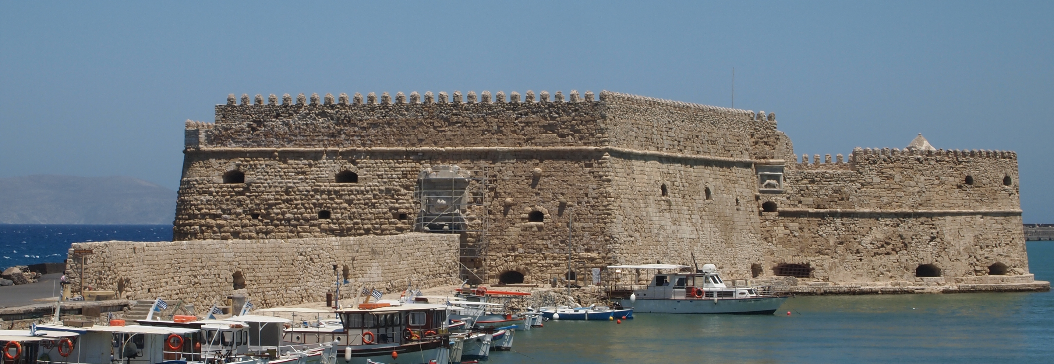 Close up van het Venetiaanse Fort te Heraklion, Kreta.